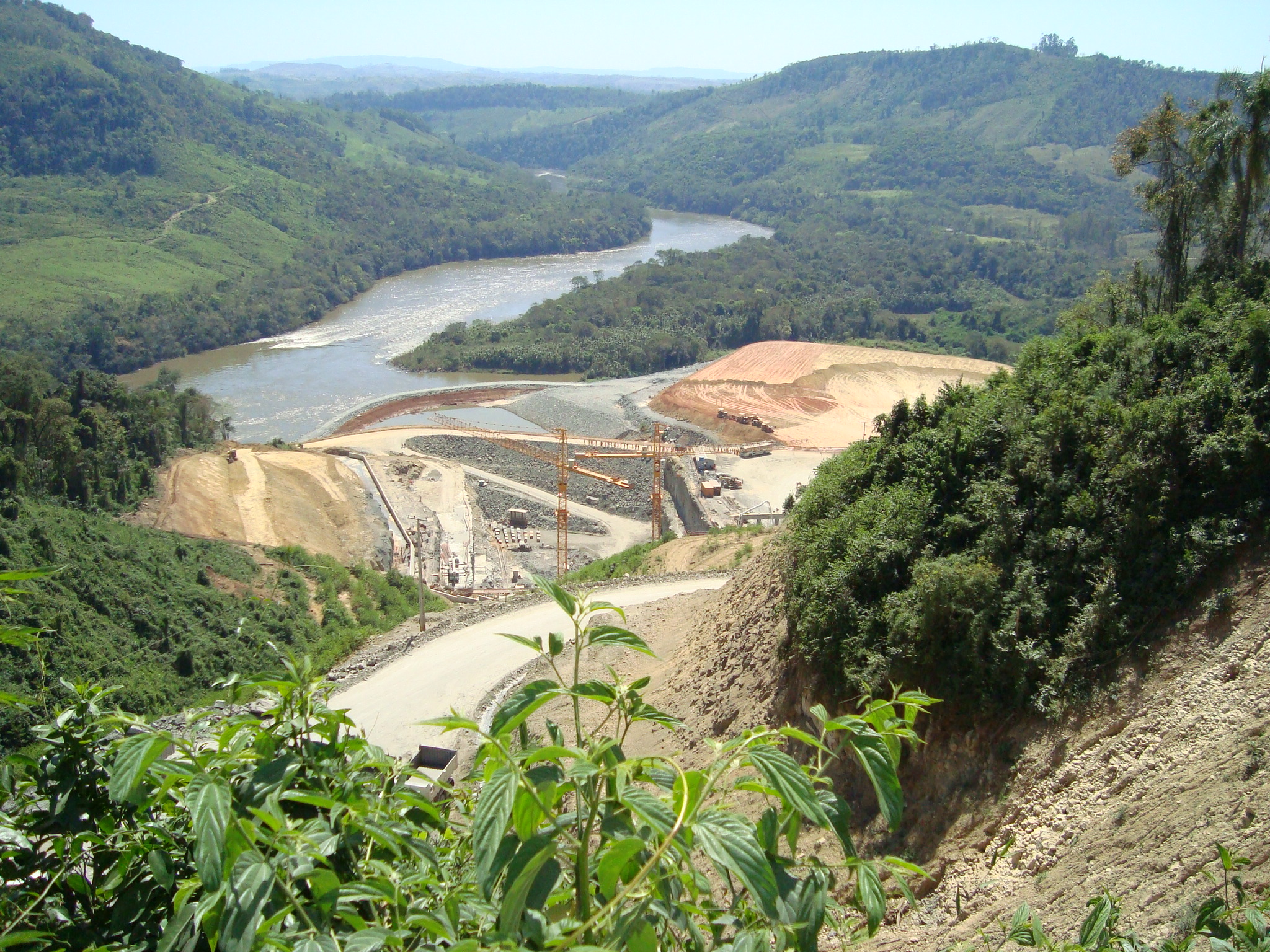 Usina Mauá (Eletrosul/Copel)